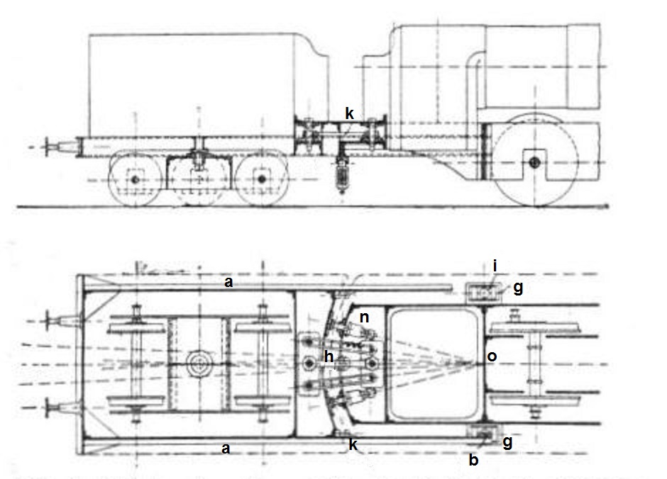 Stütztender Bauart Engerth-Krauss